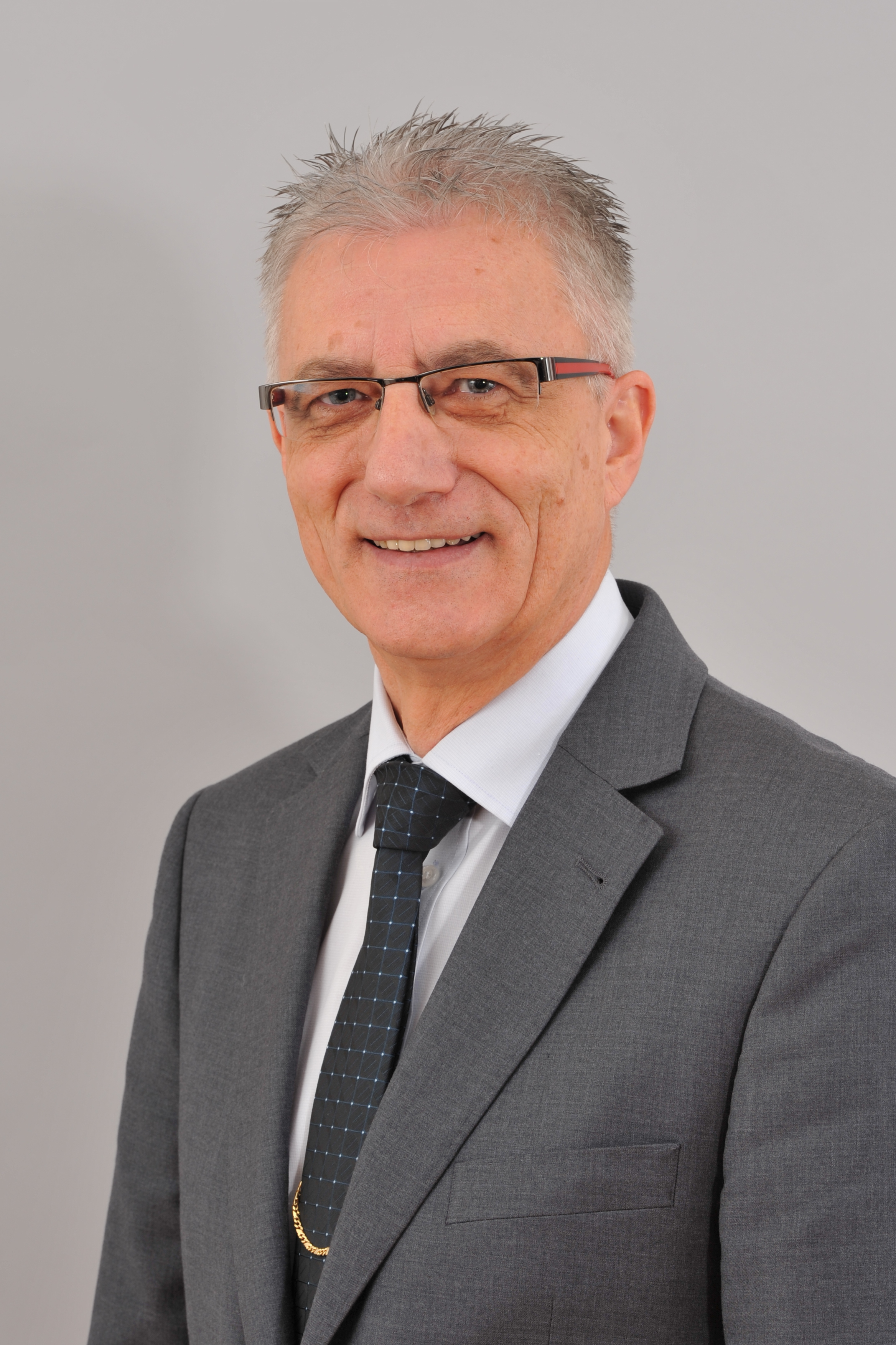 Landtagsprojekt Salzburg: Walter Steidl